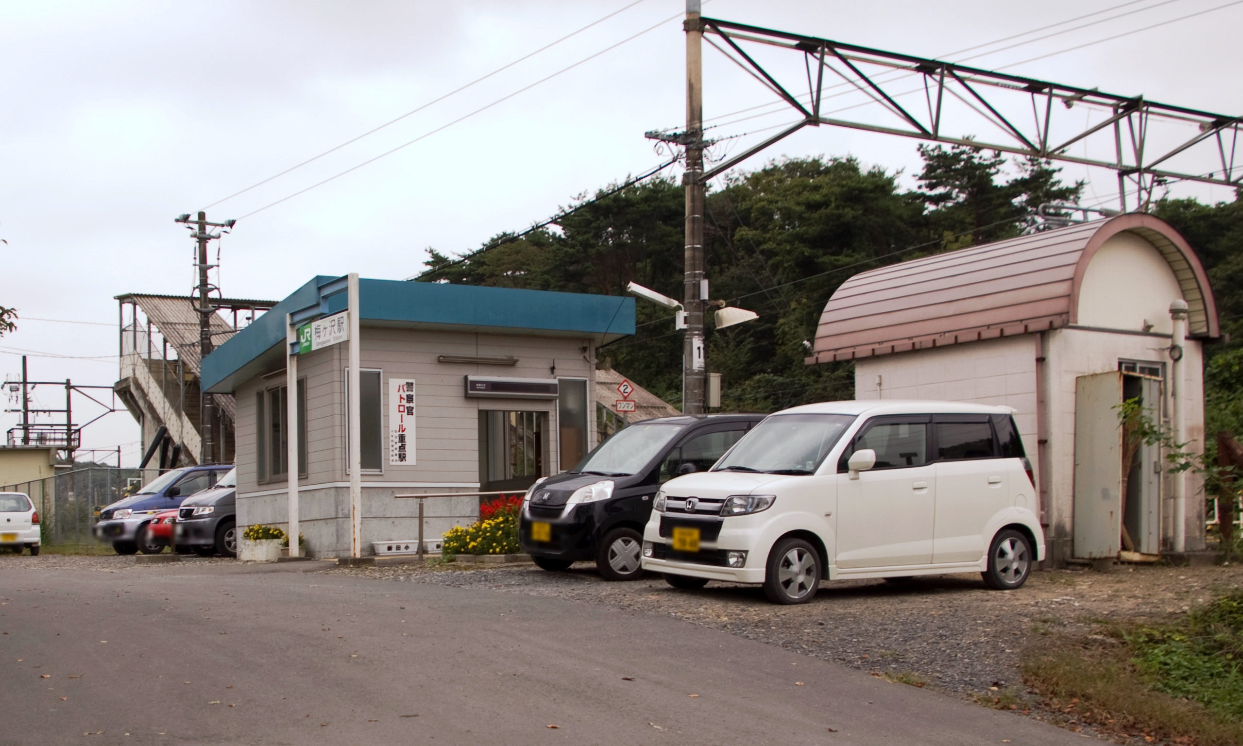 東日本旅客鉄道株式会社東北本線梅ヶ沢駅 Umegasawa Station. East Japan Railway Co.